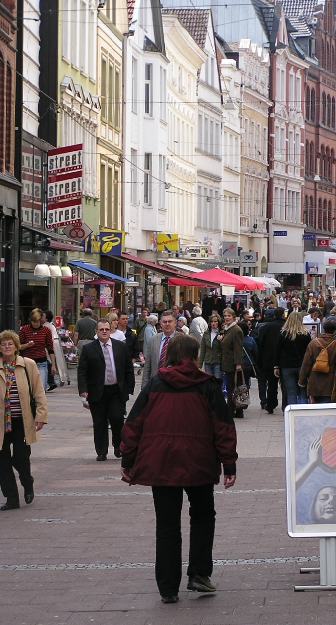 Einkaufsstraße Bäckerstraße in Minden, Nordrhein-Westfalen.